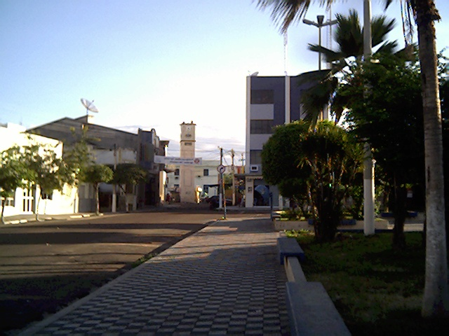 Rua Santos Dumont, cidade de Crateús, Ceará, Brasil, 2005.